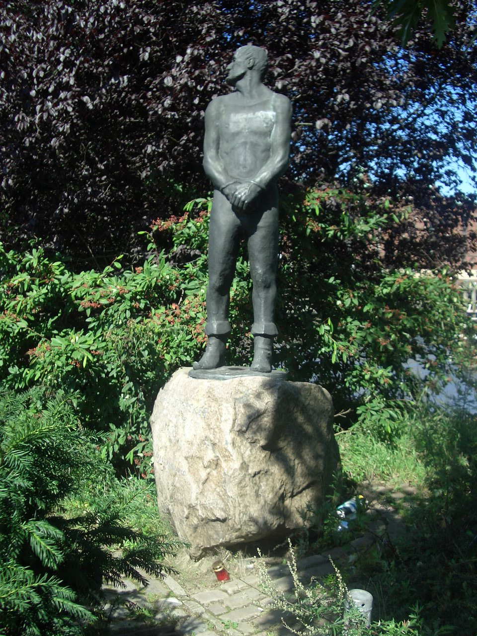 Störtebeker-Denkmal von Hansjörg Wagner am Brooktor in der HafenCity / Stoertebeker Monument by Hansjörg Wagner in Hamburg, Germany